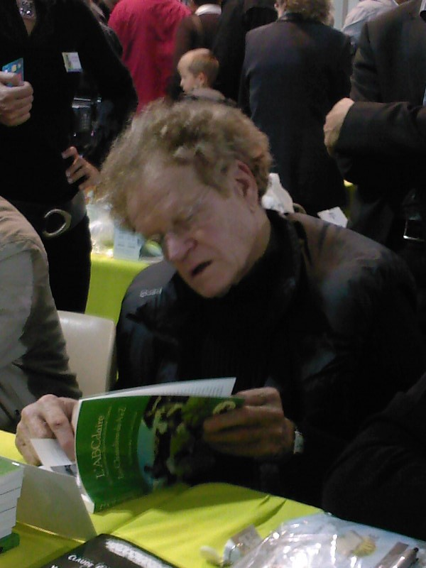 Robert Herbin à la Fête du Livre de Saint-Etienne en 2009, feuilletant L'ABCdaire de l'Association Sportive de Saint-Étienne (ouvrage de Paul Bonnetain et Claude Chevally).